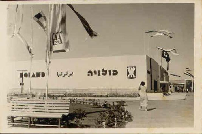 תערוכת "הגמל המעופף" שנערכה בנמל תל אביב אחת למספר שנים.